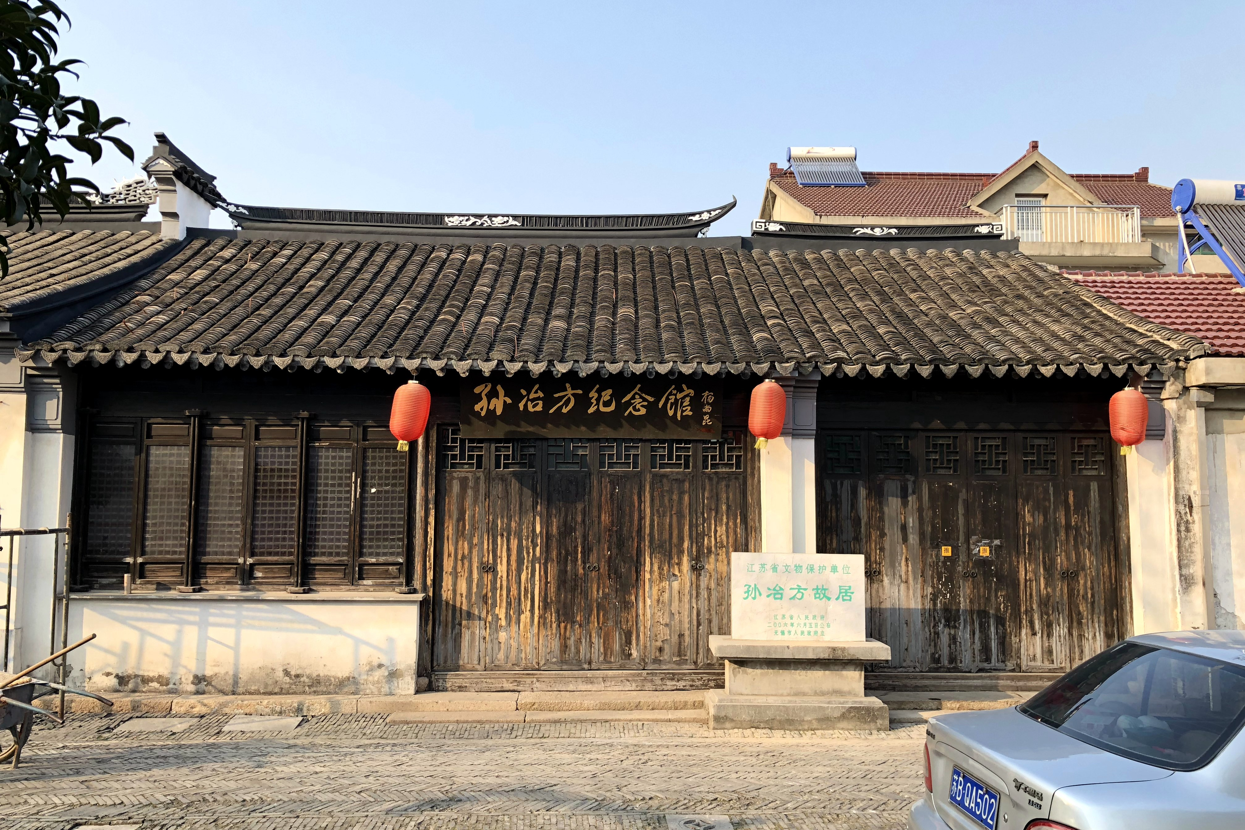 中文（中国大陆）: 孙冶方故居